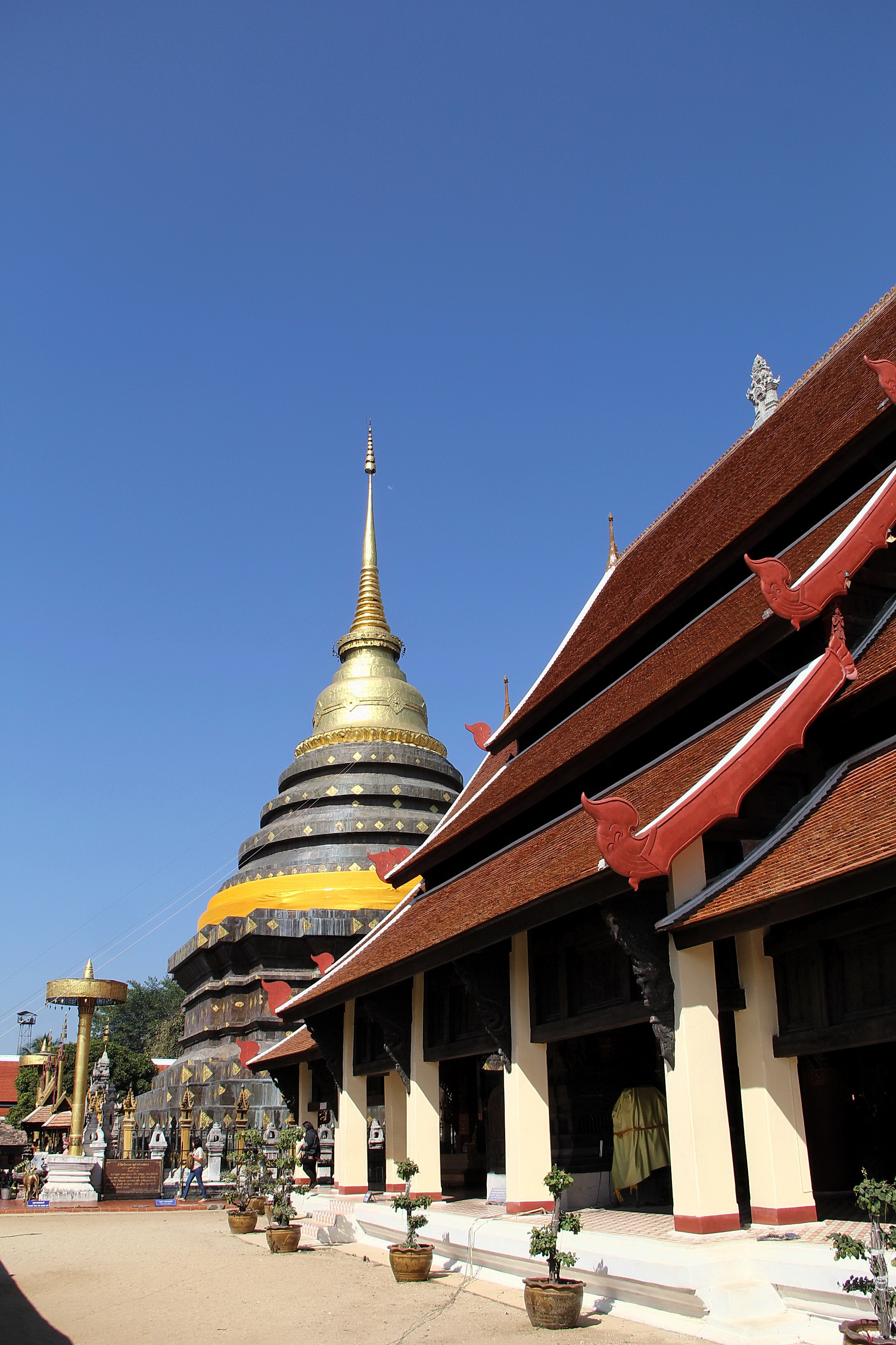 ความสำคัญของวัดพระธาตุลำปางหลวง 1.เป็นต้นกำเนิดของคำว่า “ลำปาง” จนมาเป็นจังหวัดลำปางในปัจจุบัน 2.เป็นวัดที่พระมหากษัตริย์ไทย เจ้าผู้ครองนครลำปางและภาคเหนือทั้งหมดเคยเสด็จและยกย่องว่าเป็นหลักของบ้านเมืองสืบมาทุกยุคทุกสมัย 3.ในตำนานระบุไว้ว่ามีพระบรมสารีริกธาตุของพระพทธเจ้าส่วนสำคัญบรรจุอยู่ในพระธาตุเจดีย์ ได้แก่พระเกศา พระอัฐิธาตุ พระนลาตข้างขวา พระอัฐิธาตุพระสอด้านหน้าด้านหลัง ที่พระกุมาระกัสสะปะเถระเจ้าและพระเมฆิยะเถระเจ้าอัญเชิญมาประดิษฐานไว้ 4.เป็นที่ประดิษฐานพระแก้วมรกต 5.มีอนุสรณ์การกอบกู้อิสรภาพของดินแดนล้านนาไม่ให้ตกเป็นเมืองขึ้น